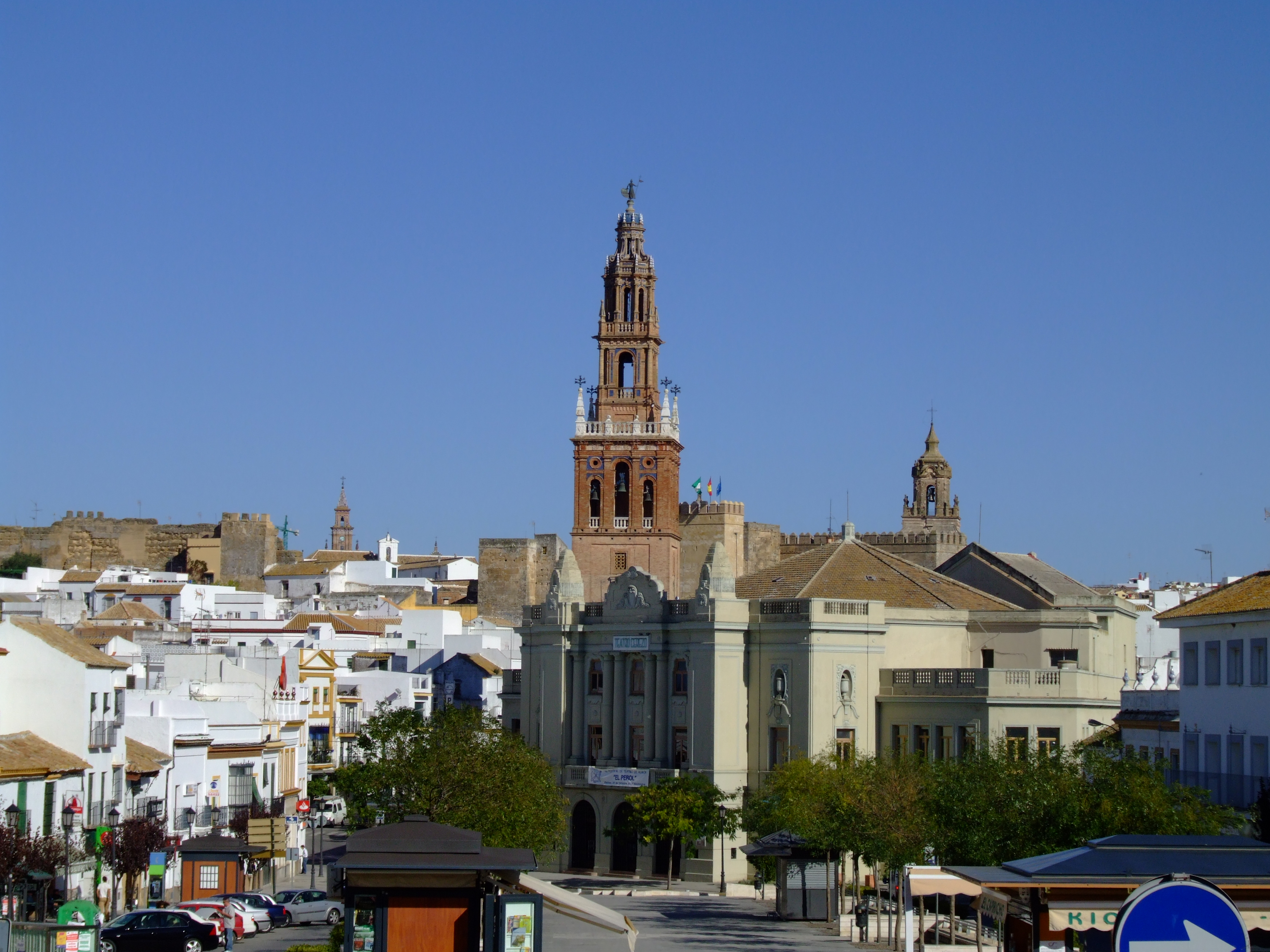 Paseo del Estatuto. Carmona